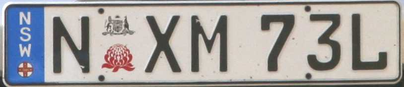 Nummernschild im Euro-Format des australischen Bundesstaates New South Wales